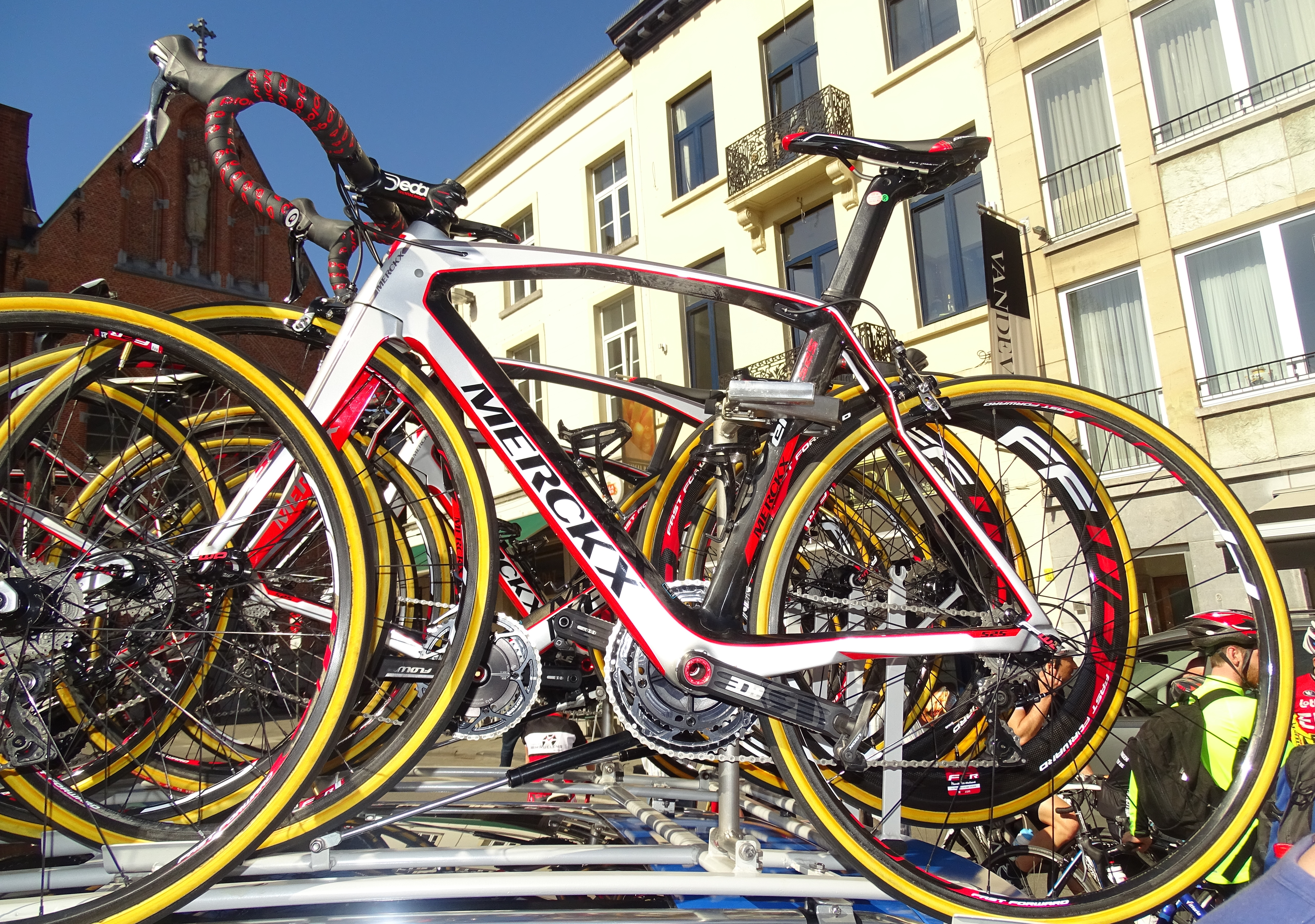 Reportage réalisé le mercredi 15 avril à l'occasion du départ de la Flèche brabançonne 2015 à Louvain, Belgique.